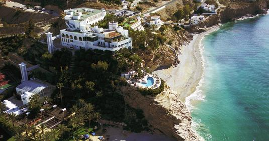 Hotel Montiboli,Villajoyosa (España).